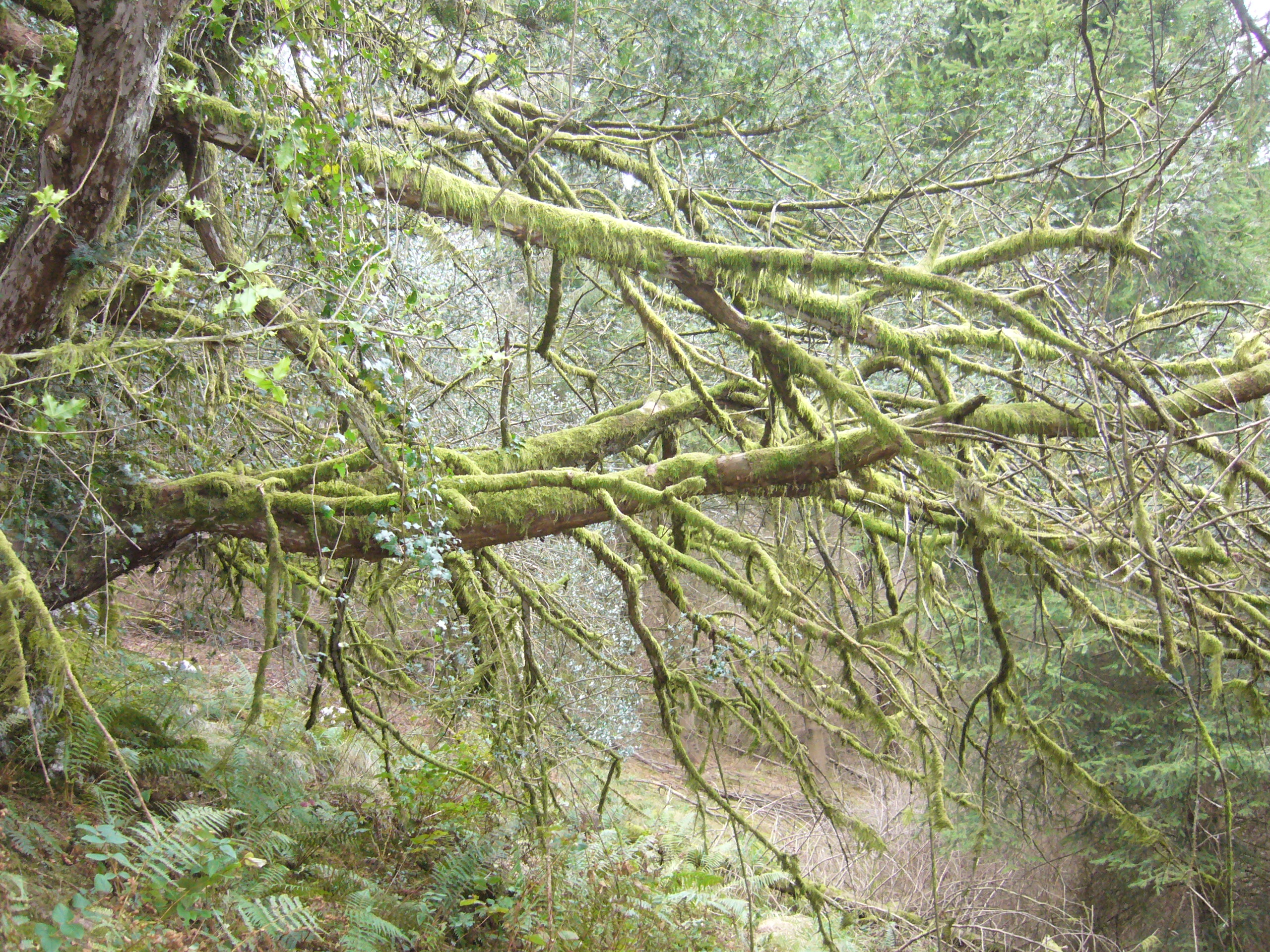 Behonarrobiko hagina. Pagoeta.